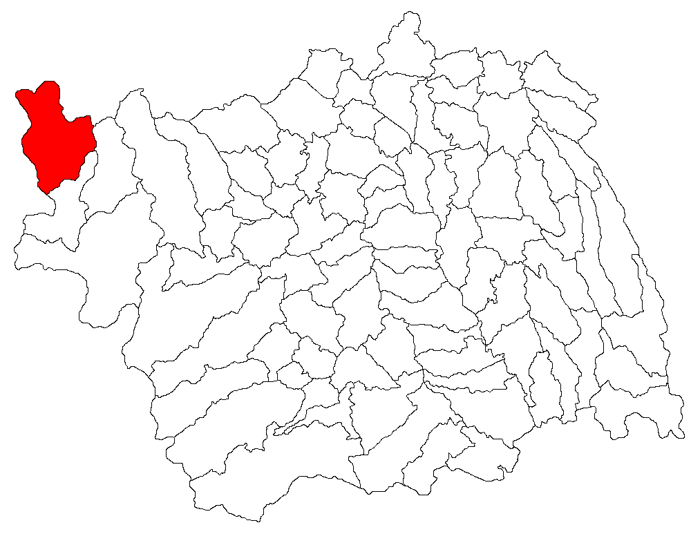 Categorie:Hărţi ale judeţului Bacău